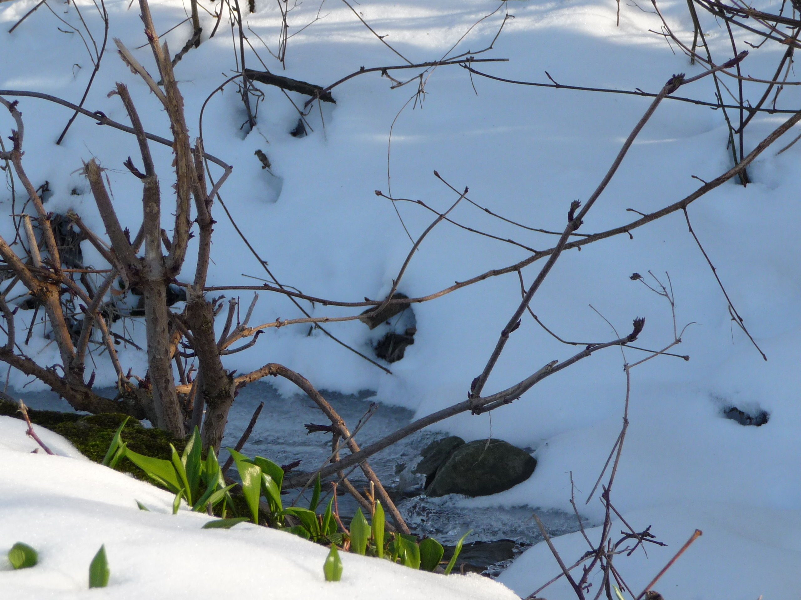 Bärlauch spitzt aus dem Schnee.